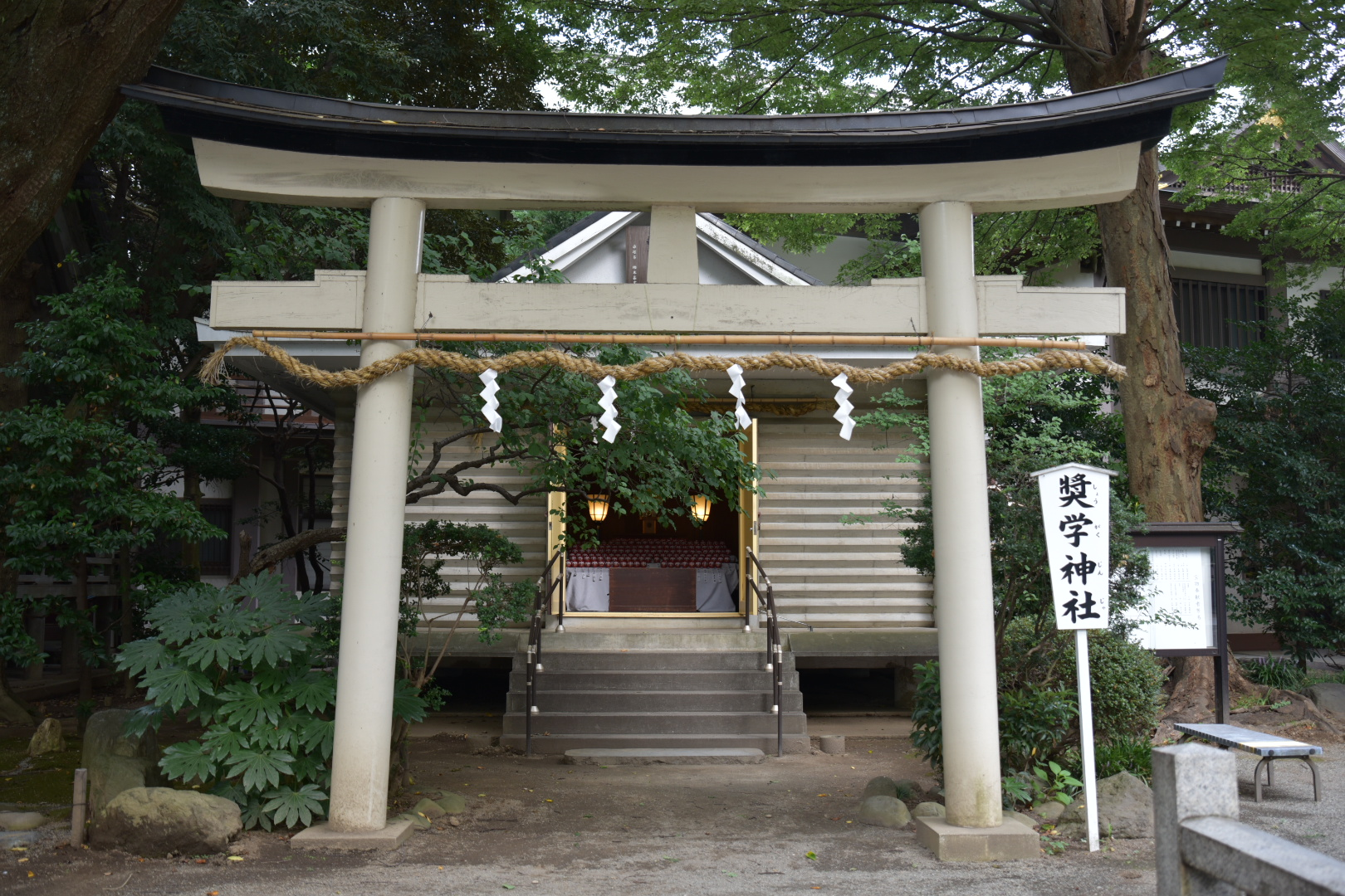 前鳥神社の境内社「奨学神社」